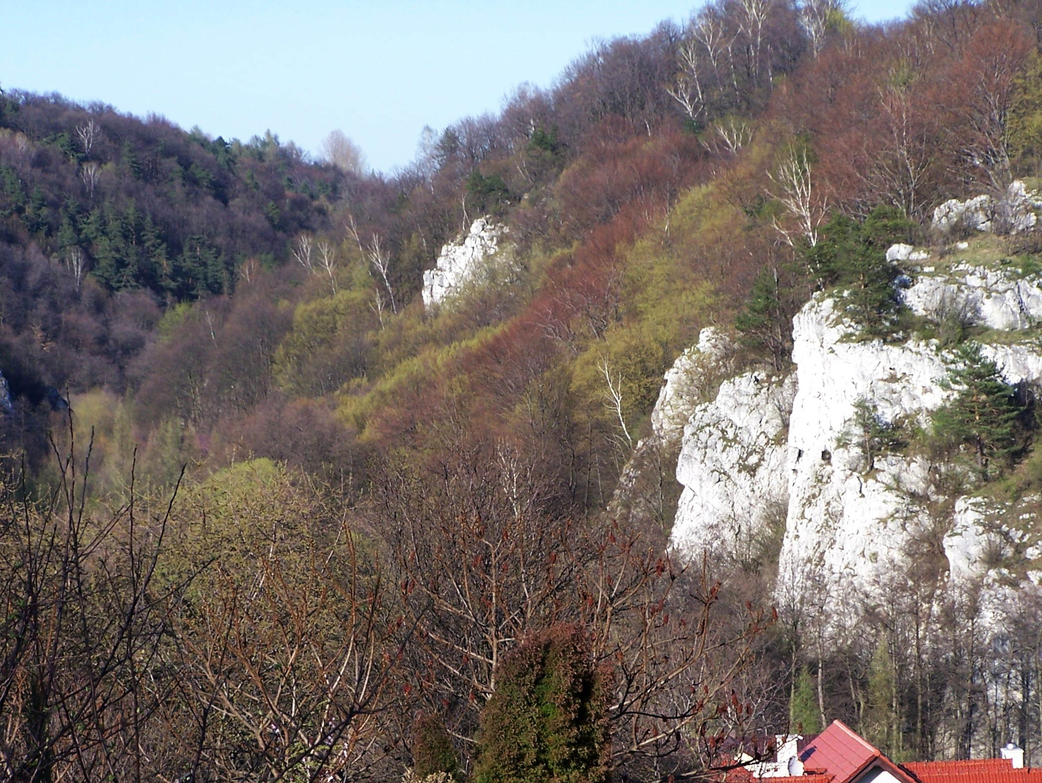 Dolina Kluczwody (Dolinki Krakowskie)